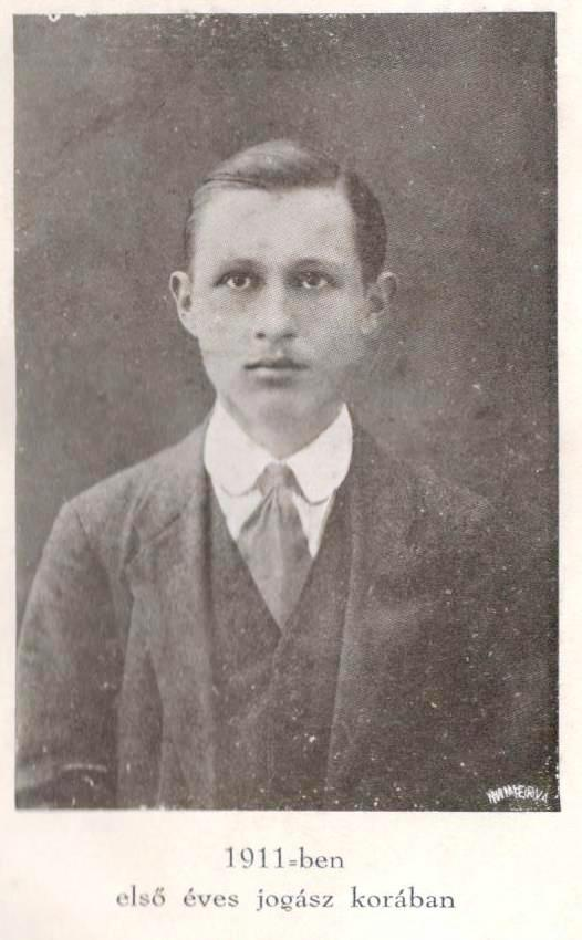 Sipos Domokos jogász hallgató 1911-ben